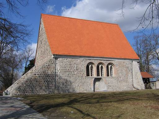 Kościół pw. Matki Boskiej Wspomożycielki Wiernych w Będargowie – elewacja południowa